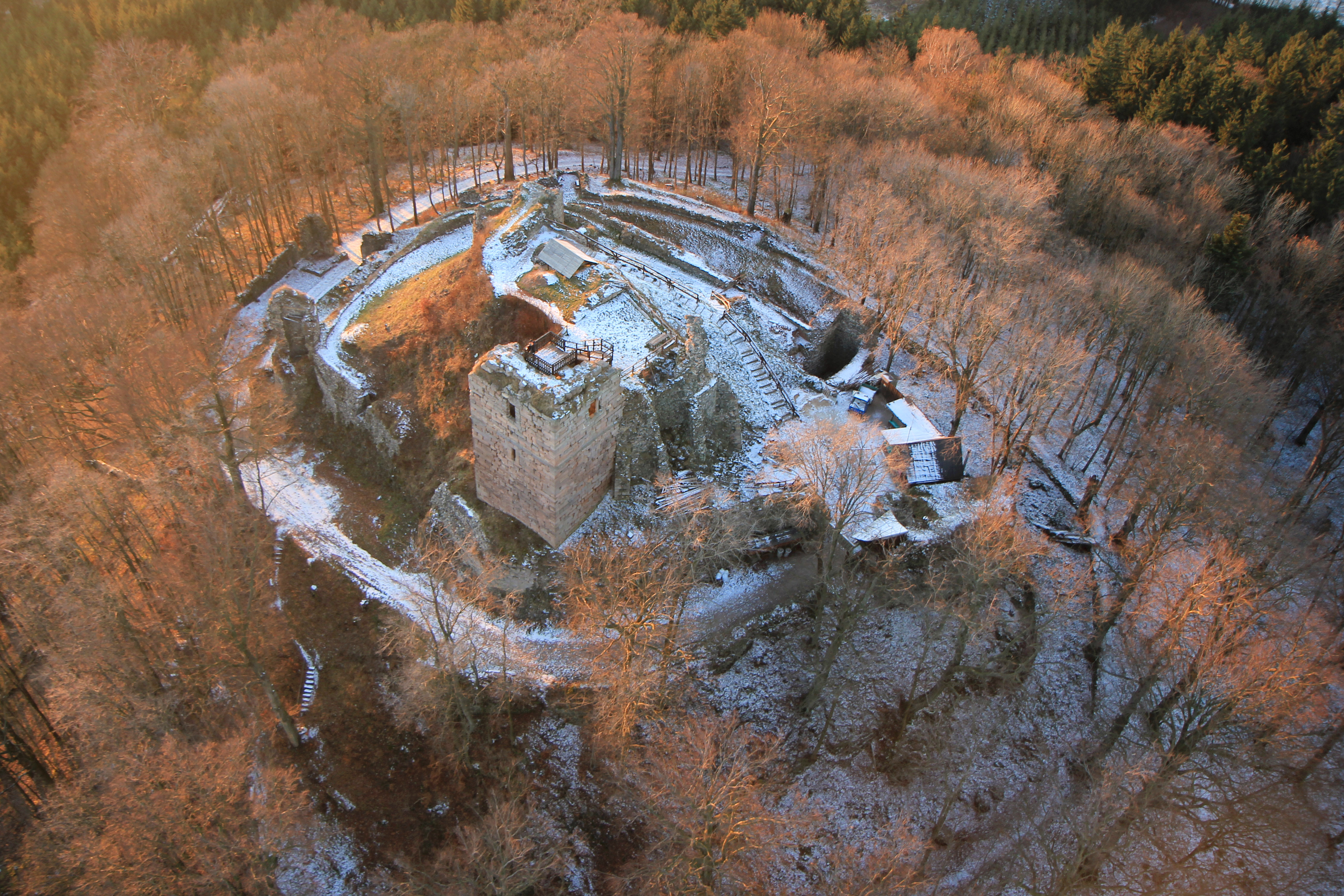 Hrad Kumburk, Syřenov.